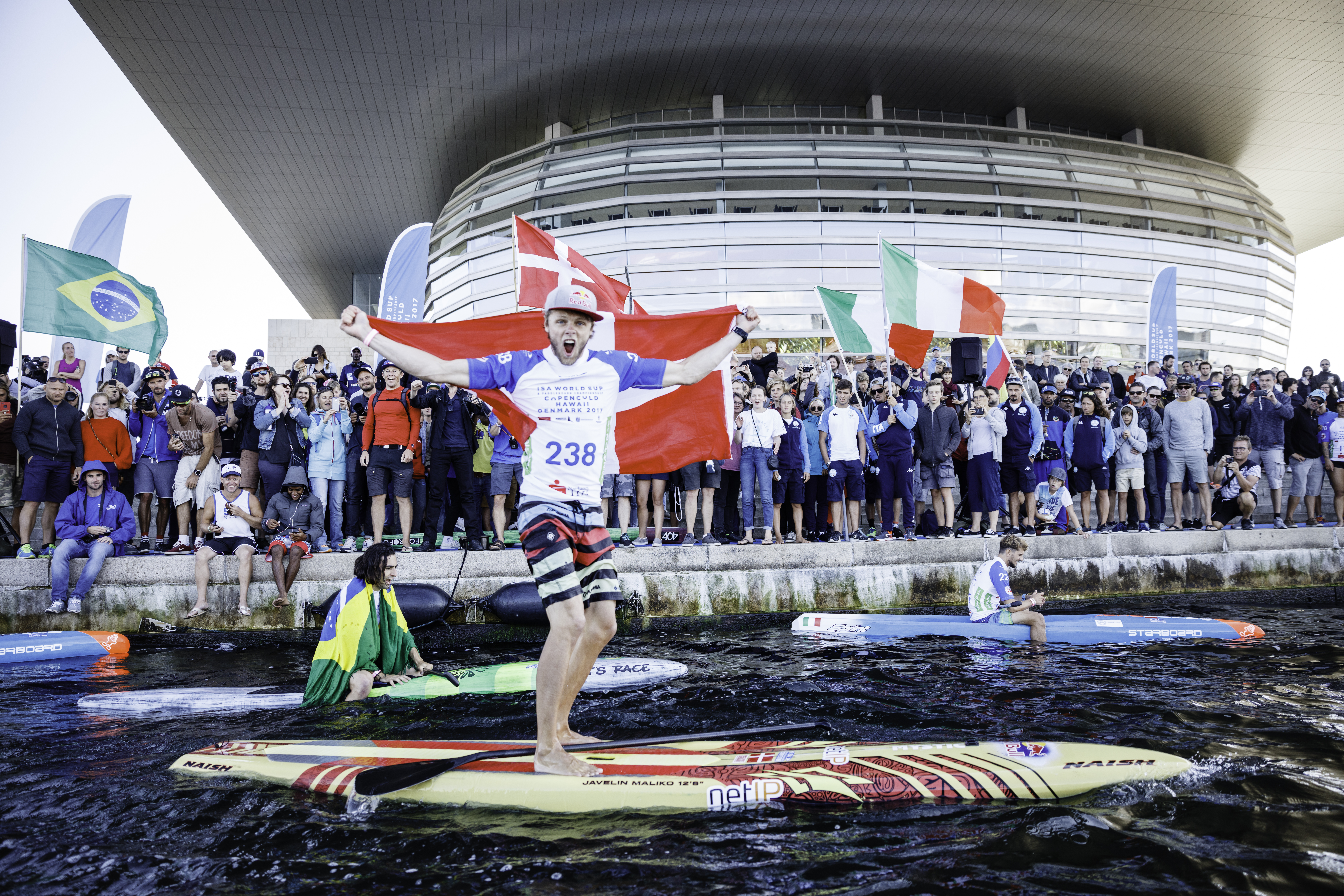 Casper Steinfath vinder SUP-VM i 200 meter sprint foran Operaen i København i 2017.Foto: Ben Reed/ISA